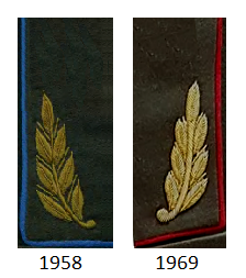 петлицы генералов